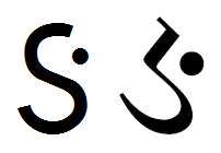 нгакар гуджарати